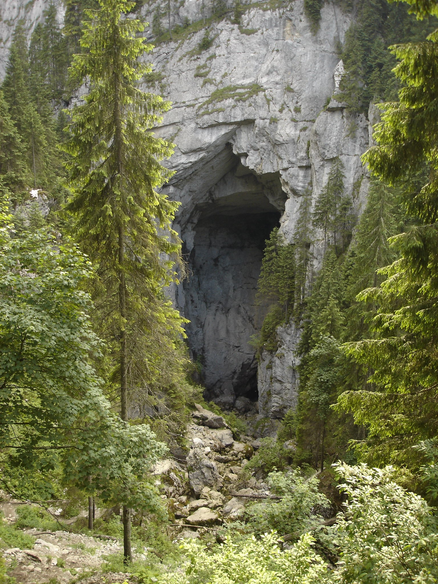 A Csodavár sziklakapuja a Pádis-fennsíkon, Erdély